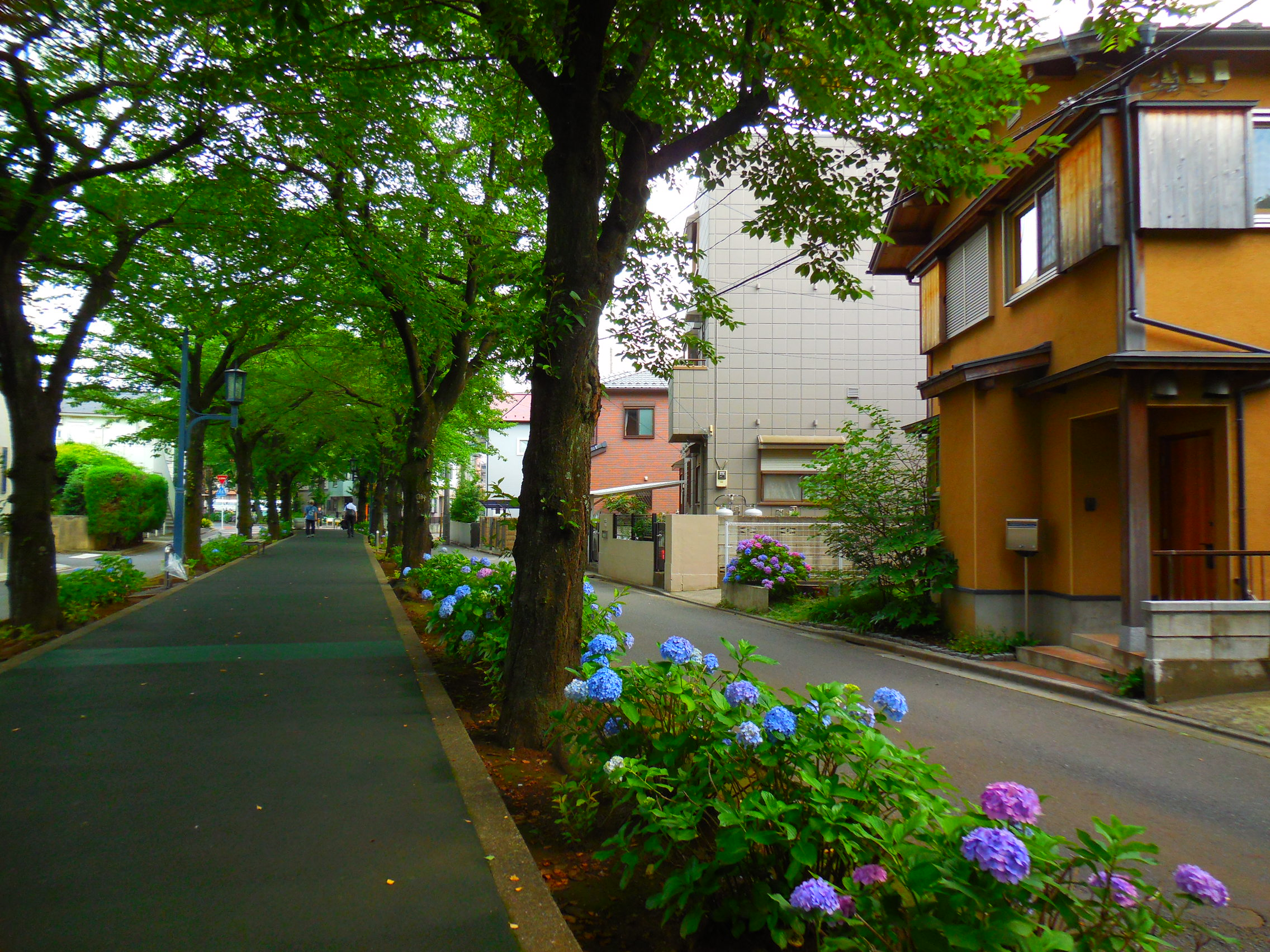 別所排水路